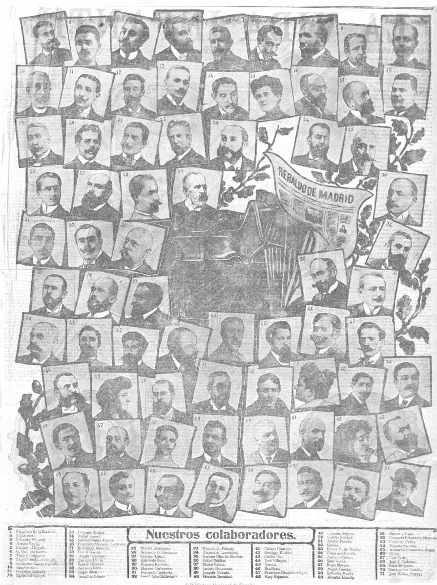 El Heraldo - nuestros colaboradores